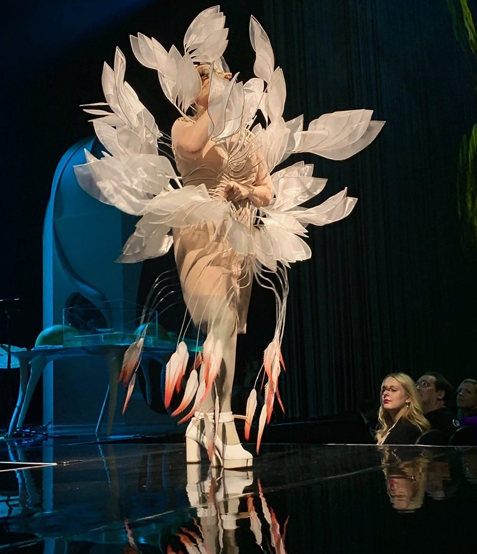 Residency Show - Björk allo Shed di New York, 6 maggio 2019